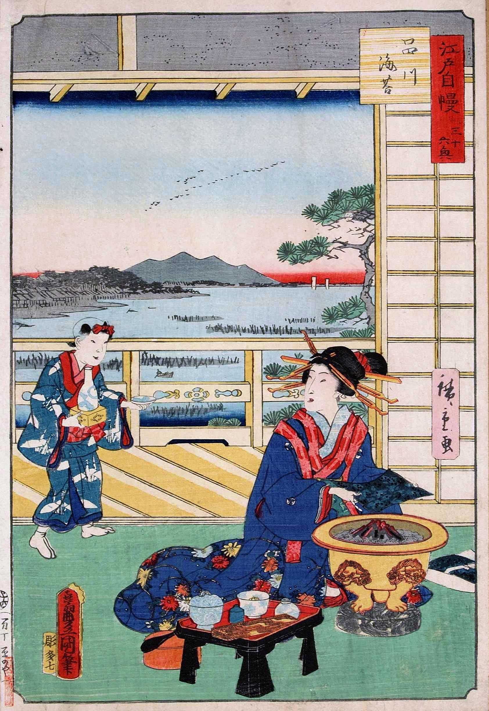 歌川広重 江戸自慢三十六興 品川海苔 1864